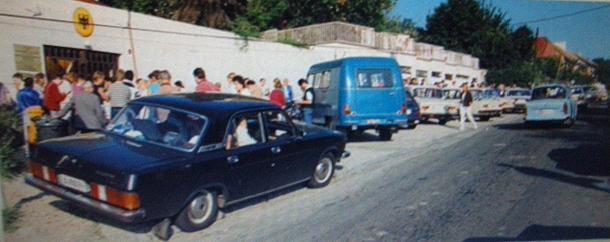 DDR-Flüchtlinge vor dem Konsulat der Bundesrepublik Deutschland in Budapest, Nógrádi utca 8.